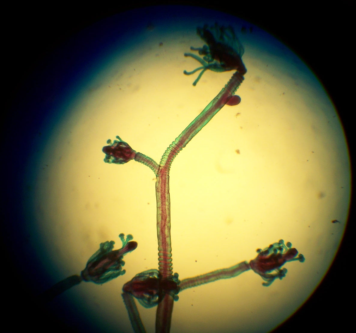 Колонія поліпів